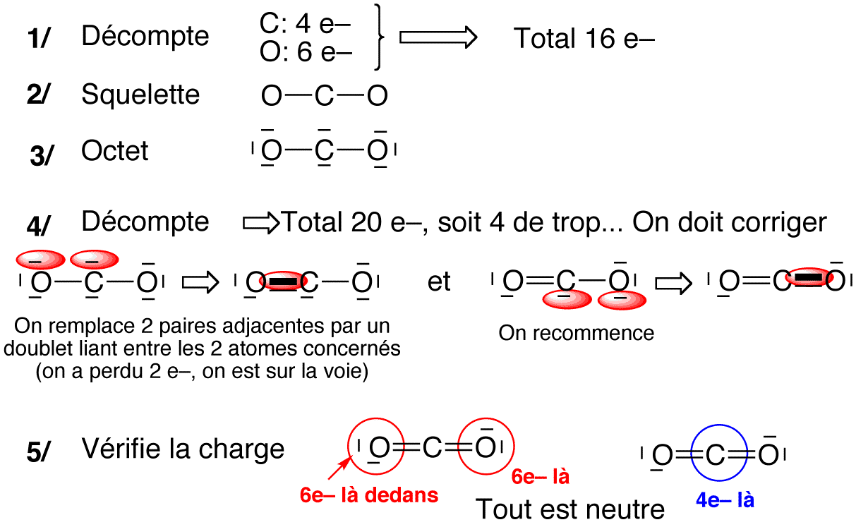 exemple d'approche pour trouver de facon systématique une forme mésomère partie 1 sur 2